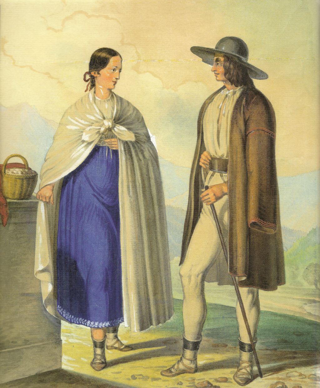 Akwarela Henryka Jastrzembskiego przedstawiająca Górali z Brennej z 1848 roku.